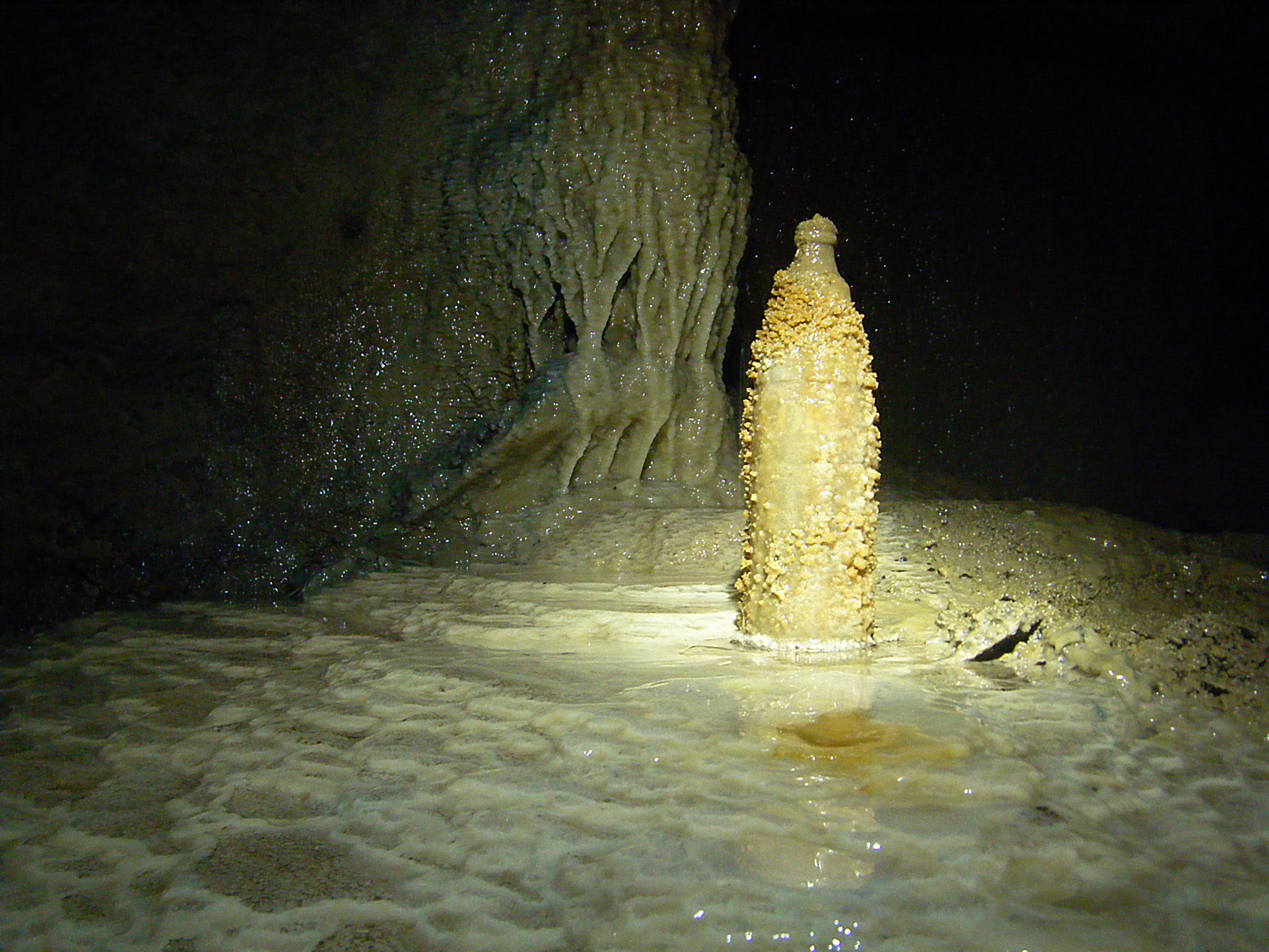 Bouteille calcifiée, Carrière de Savonnières-en-Perthois (Meuse, france)